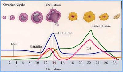 Periodus